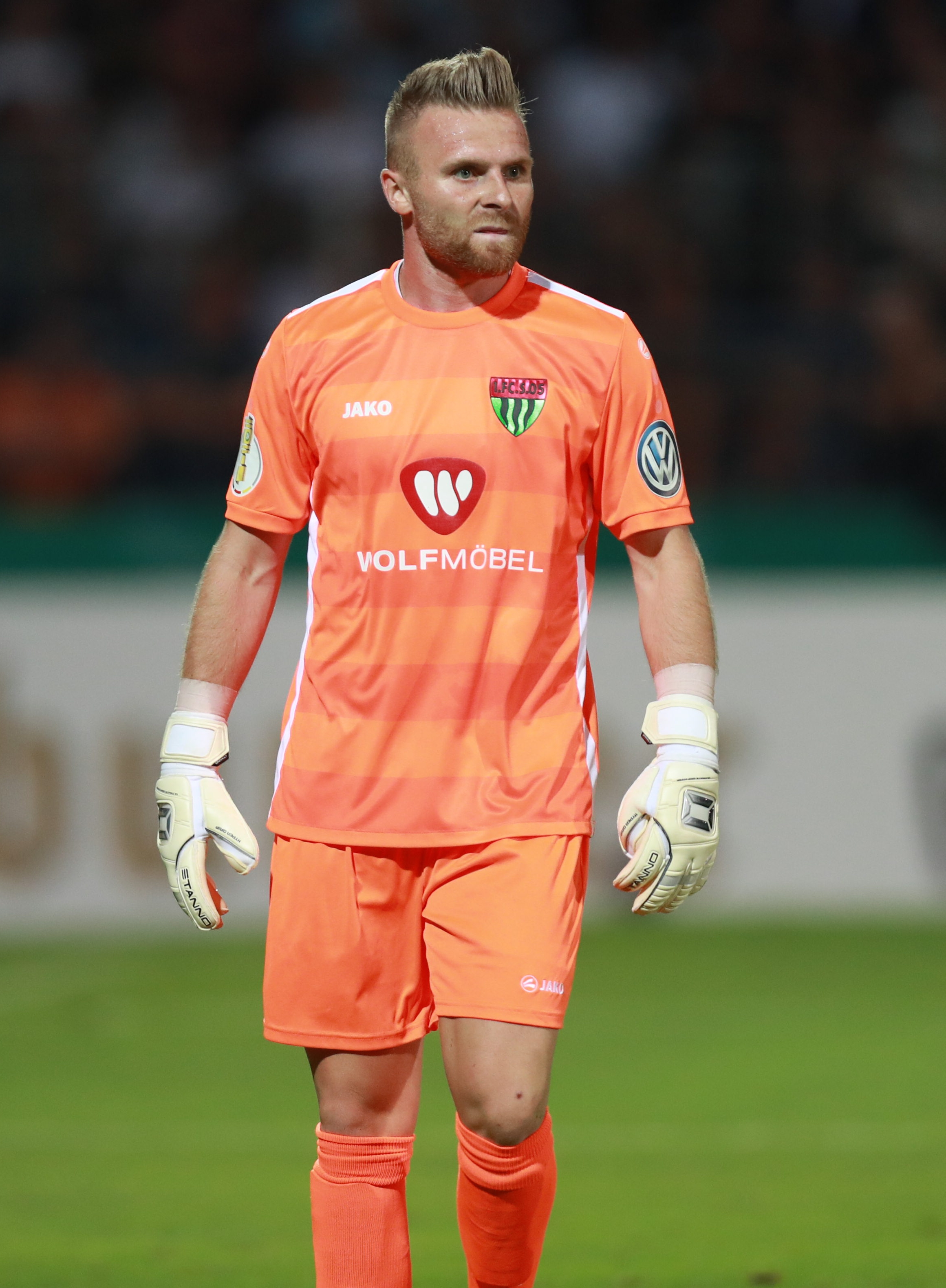 DFB-Pokal 2018/19, 1. Hauptrunde: 1. FC Schweinfurt 05 gegen FC Schalke 04 0:2 (0:1)